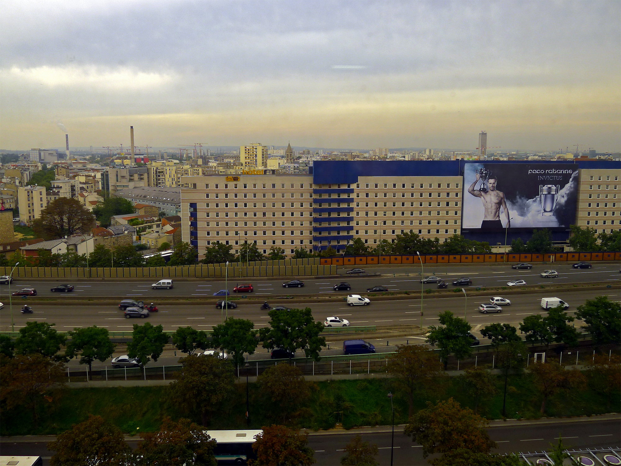 Le périphérique de Paris à la porte de Saint-Ouen - Paris XVIII